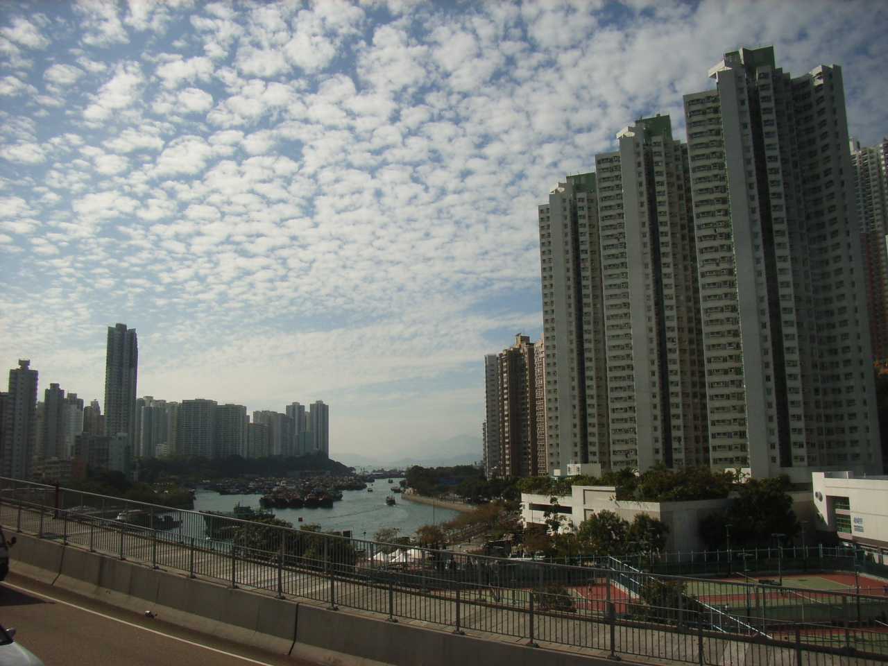 Aberdeen West Typhoon Shelter and Ap Lei Chau Bridge, Hong Kong 鴨脷洲大橋, 石排灣, 香港仔西避風塘 Photographer:User:Apade1872